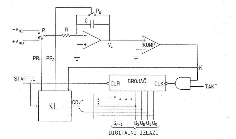 Овај слика је део пројекта семинарских радова на Електротехничком факултету Универзитета у Подгорици